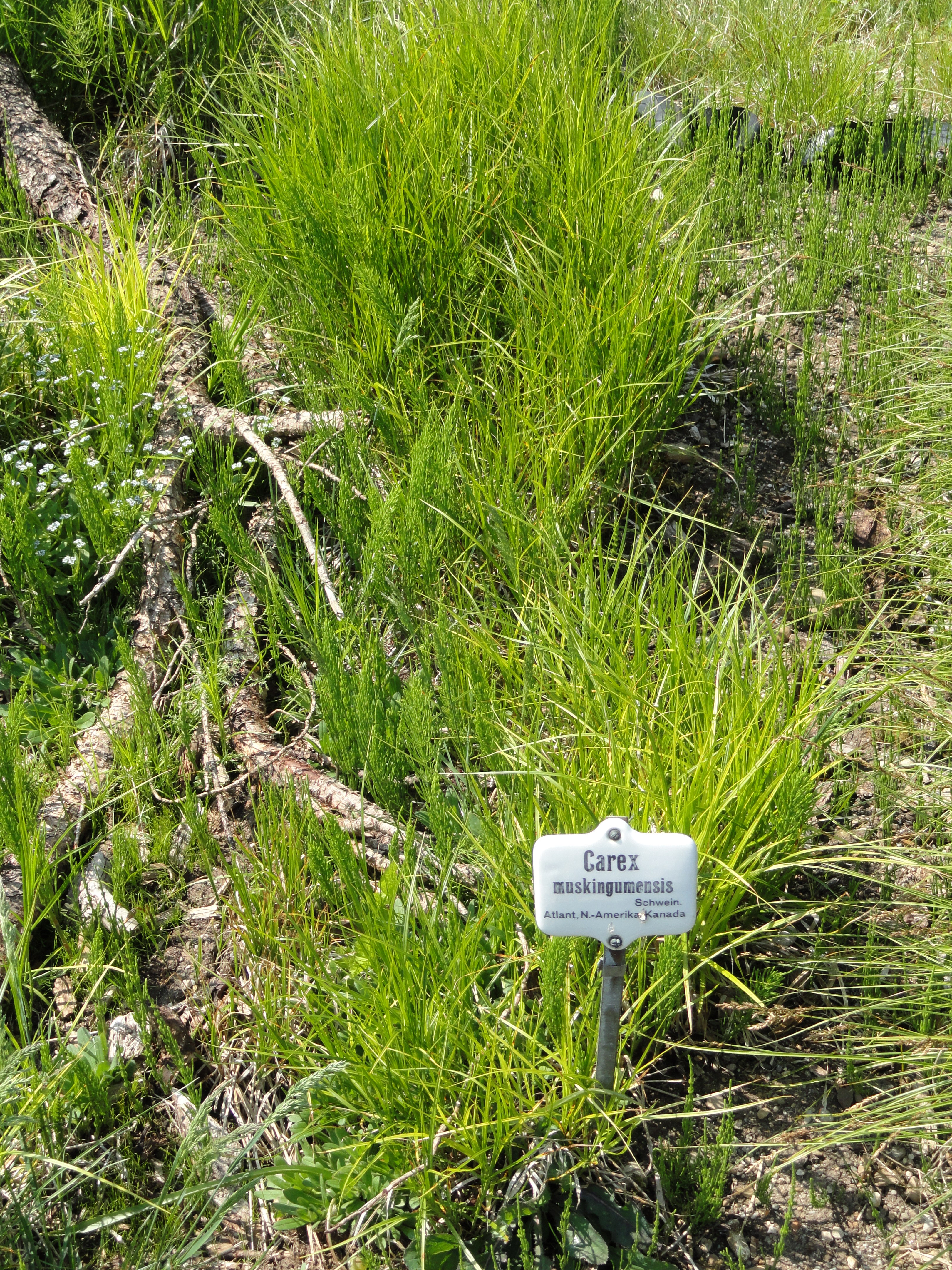 Carex muskingumensis specimen in the Botanischer Garten München-Nymphenburg, Munich, Germany.